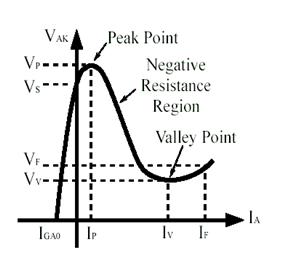 Voltajes y corrientes en el anodo